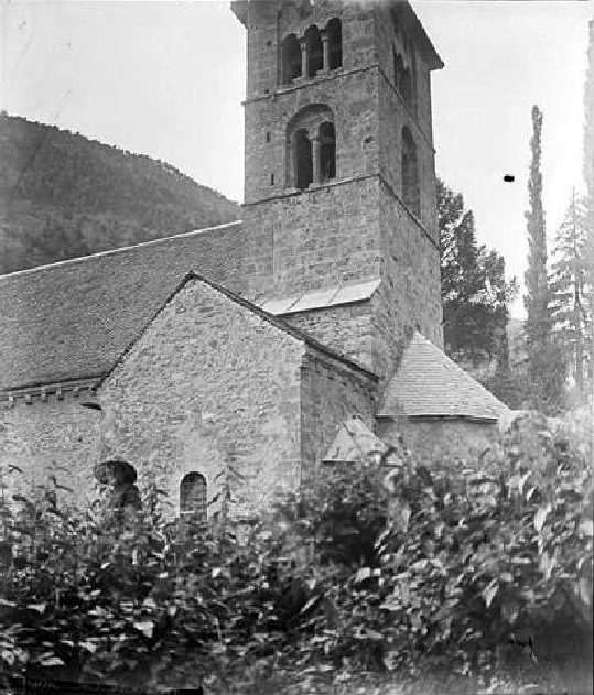 Église de Mayres Savel (Isère).